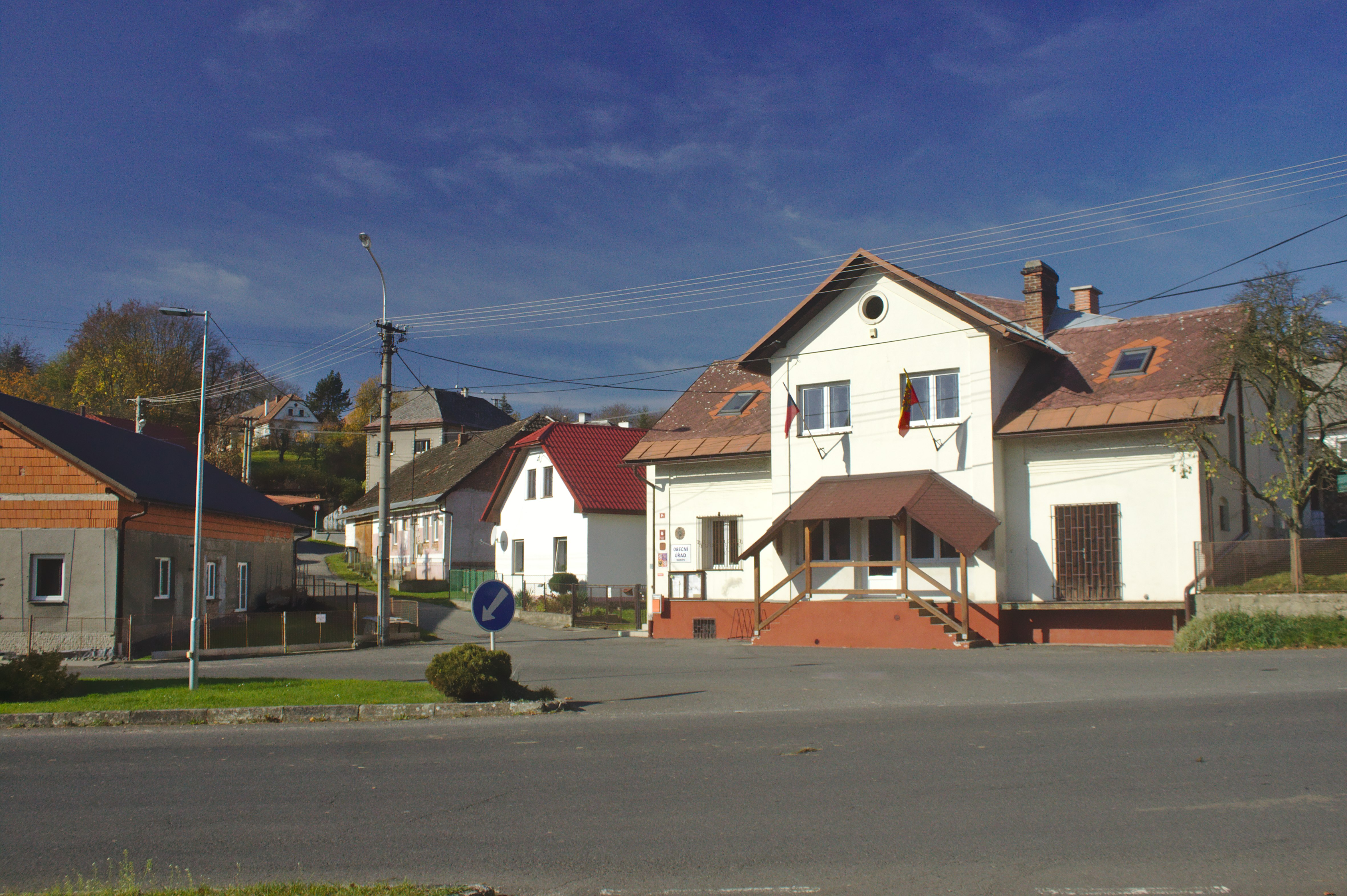 Obecní úřad v obci Kosov v Olomouckém kraji